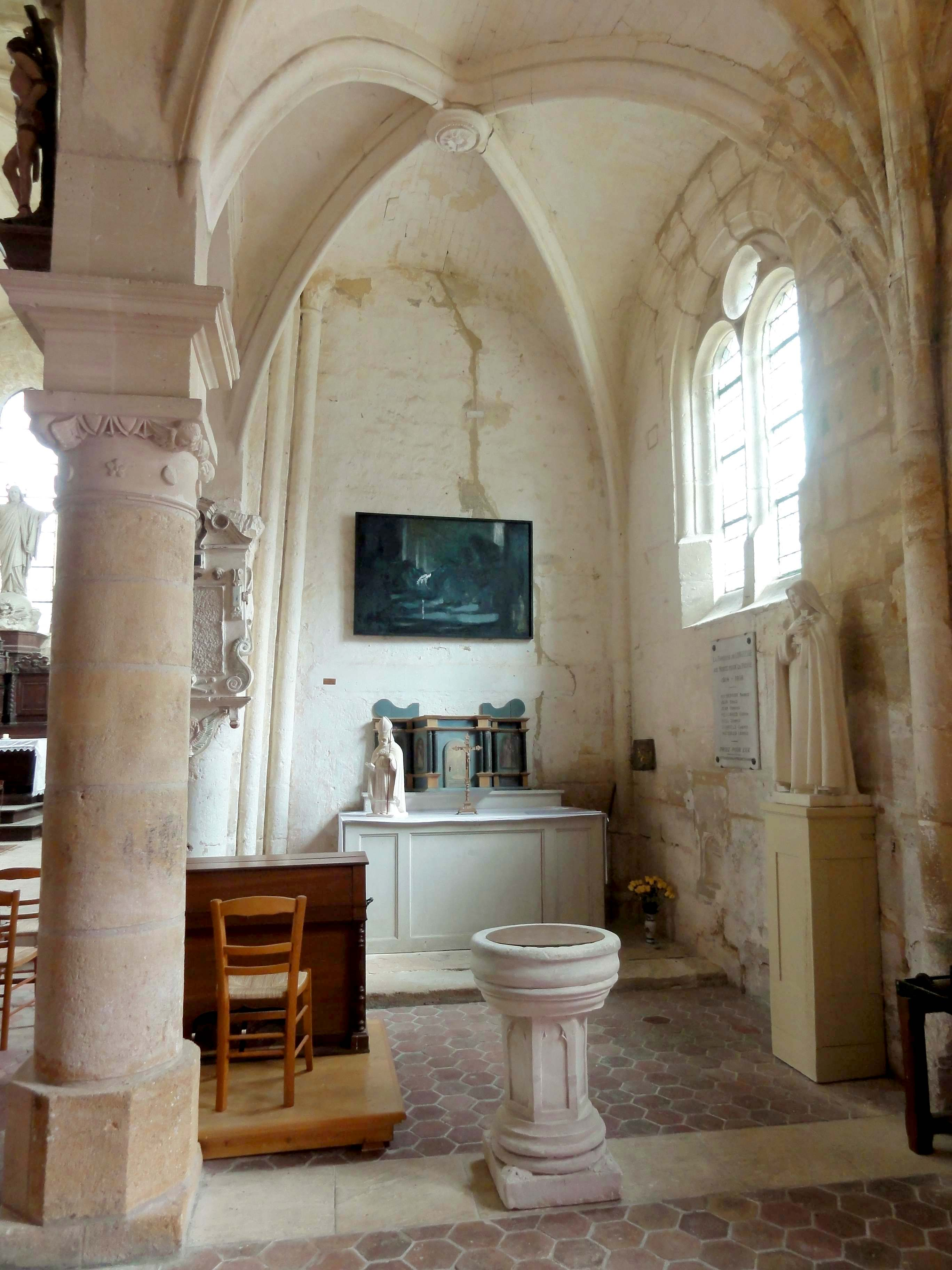 Intérieur de l'église (voir titre).